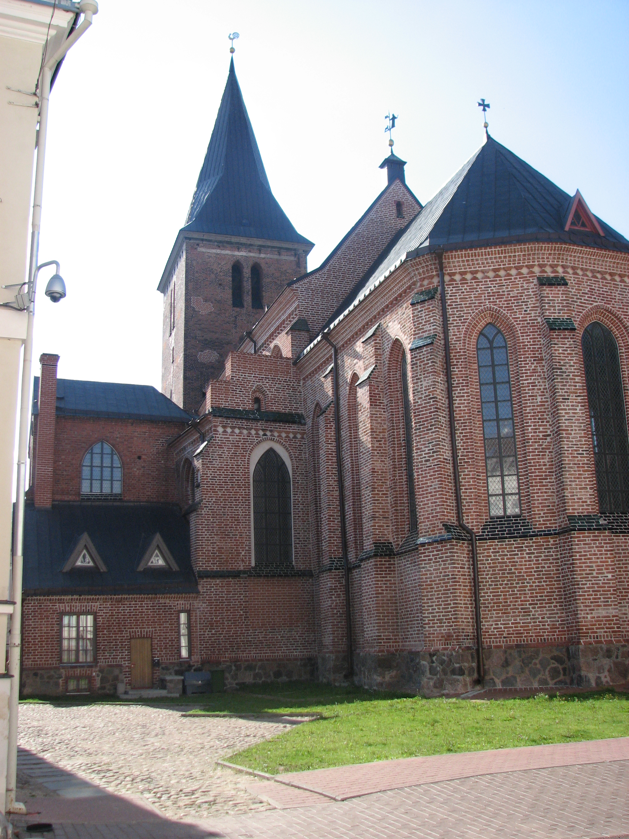 Tartu Jaani Church, Tartu, Estonia